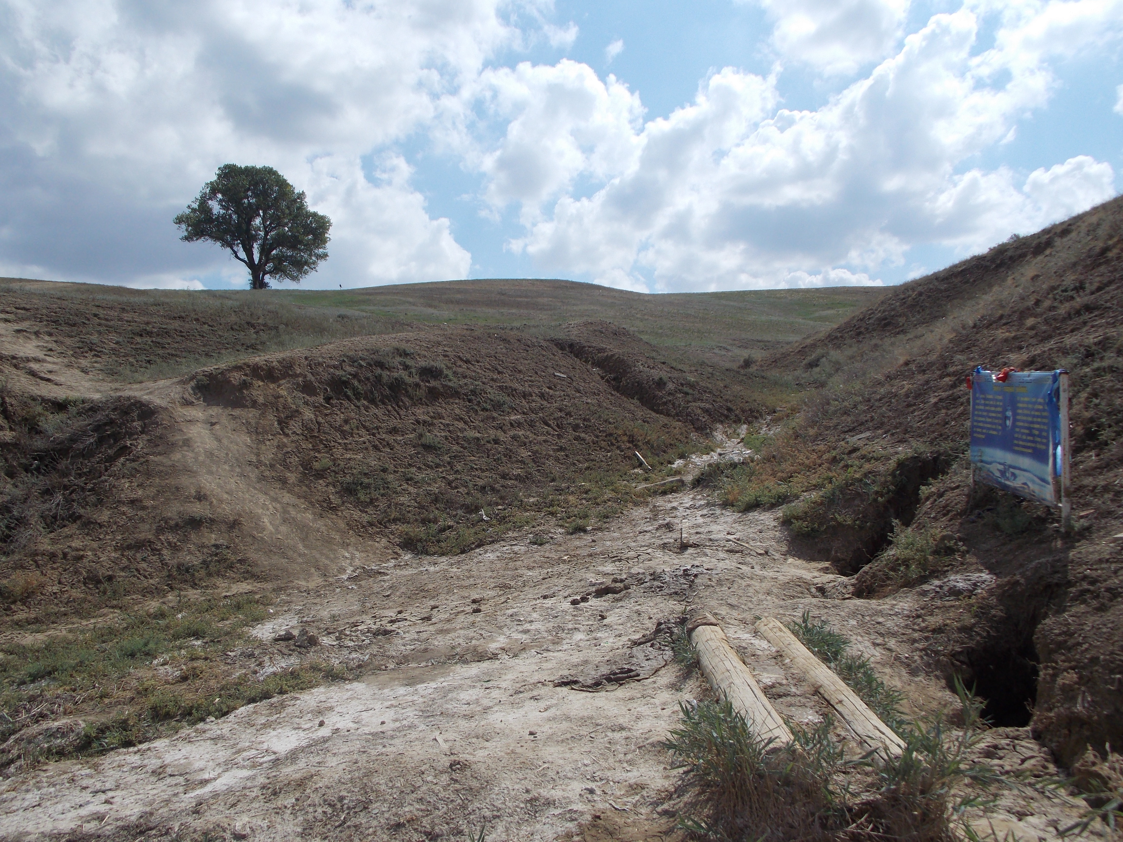 Источник возле Одинокого тополя, Калмыкия